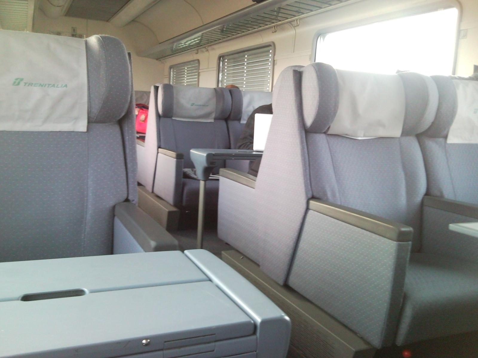 Carrozza Gran Confort delle FS